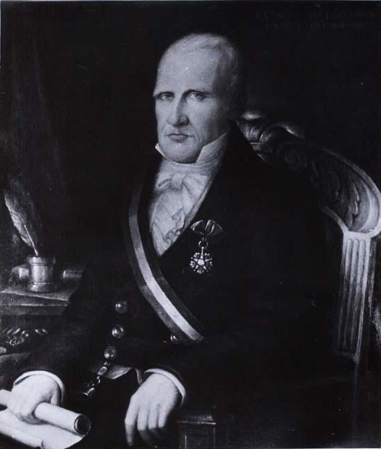 Agustín Manuel de Eyzaguirre Arechavala, (1768-1837) presidente de la República de Chile 1811-1825.